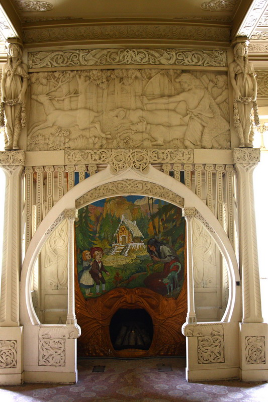 Casa Burés, obra modernista de Francesc Berenguer i Mestres Construïda entre 1900-1905. Llar de foc de la sala dels nens amb mosaïcs de Gaspar Homar i treballs de fusteria de Joan Carreres.